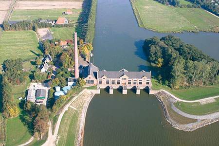 Ir. D.F. Woudagemaal, Lemmer. World Heritage Site.